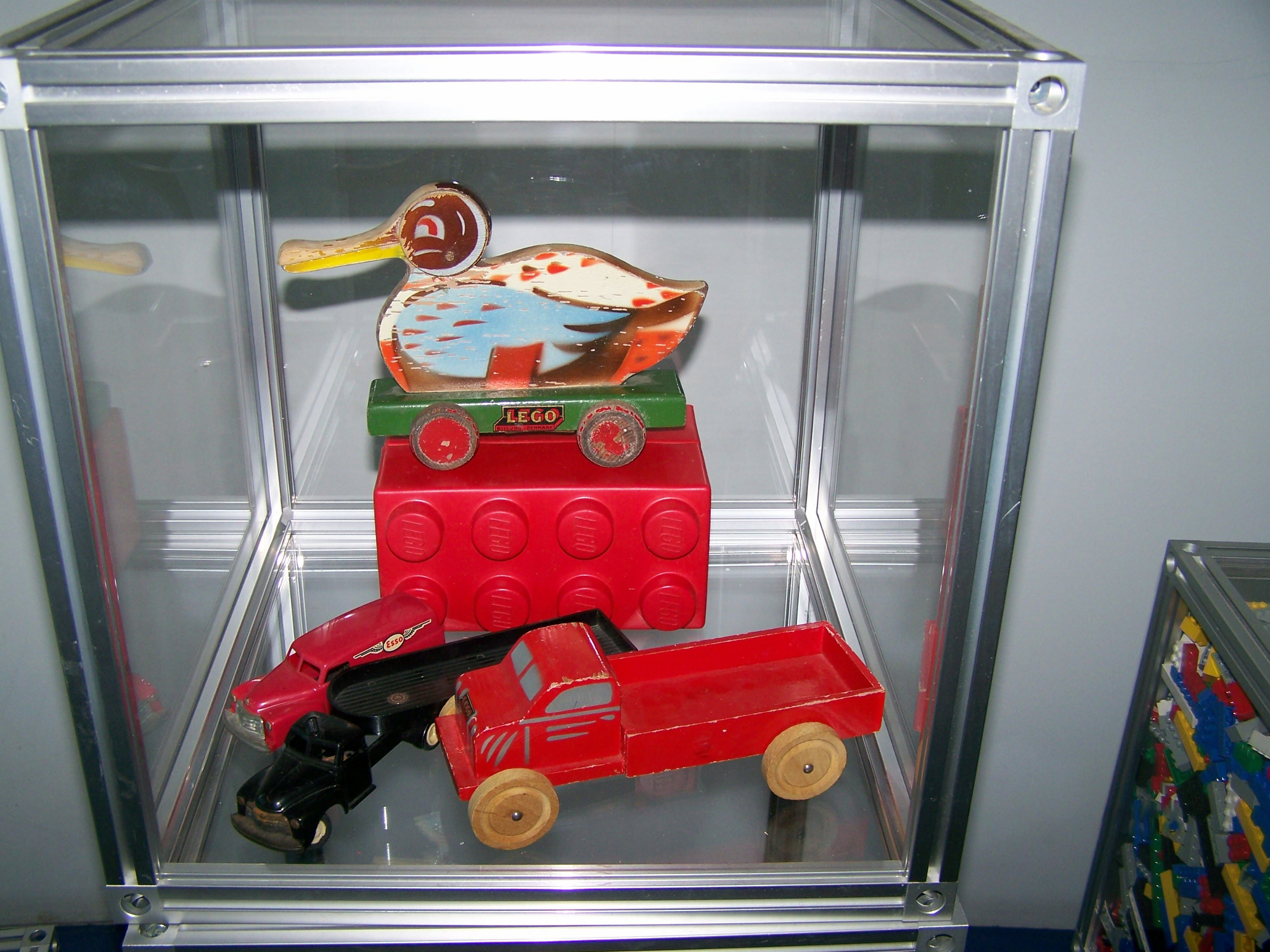 Primeiros brinquedos de madeira fabricados pela LEGO, na Dinamarca, na década de 1930 (Creation Centre, LEGOLAND Windsor).